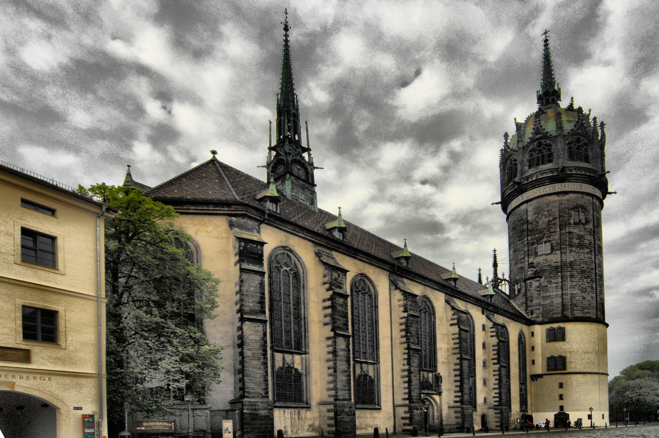 Schloßkirche Wittenberg